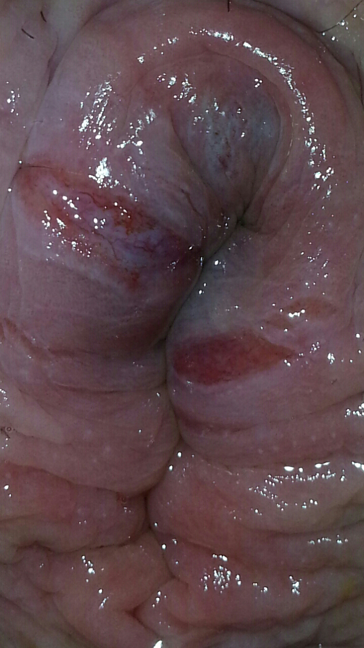 Bild des Afters zu Darstellung einer Art der Analfissur